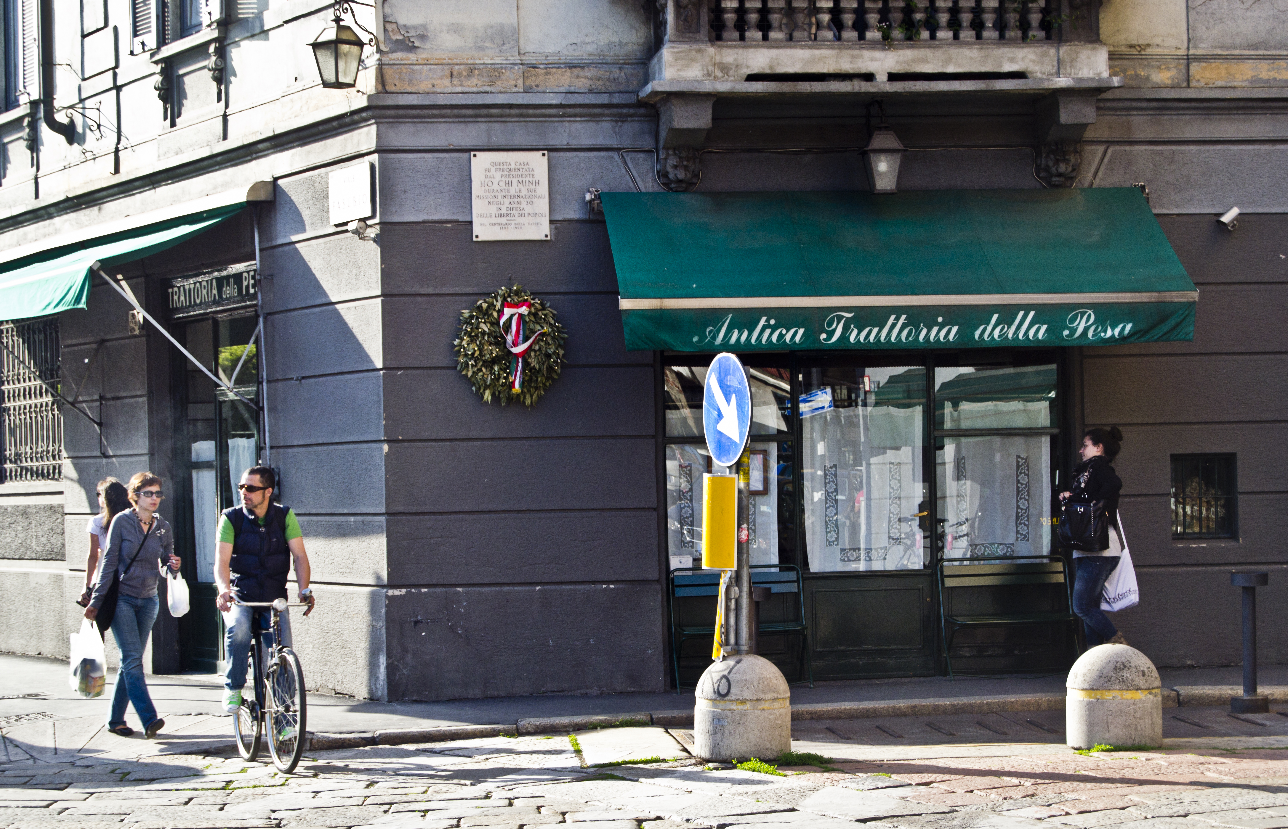 Viale Pasubio, maggio 2012 -Antica Trattoria della Pesa